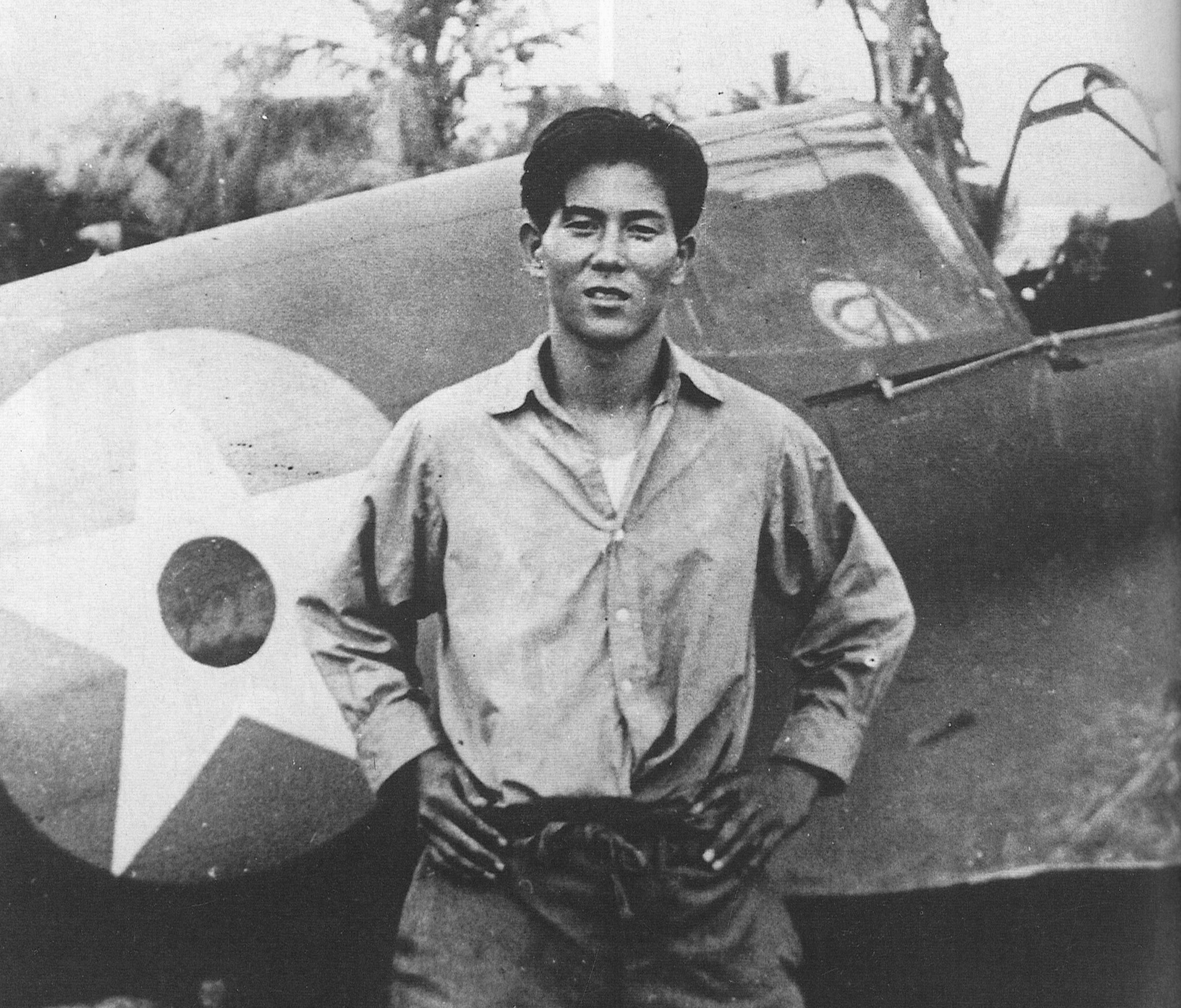 1941年オランダ領東インドにて、墜落した米軍のP-40の前に立つ笹井。